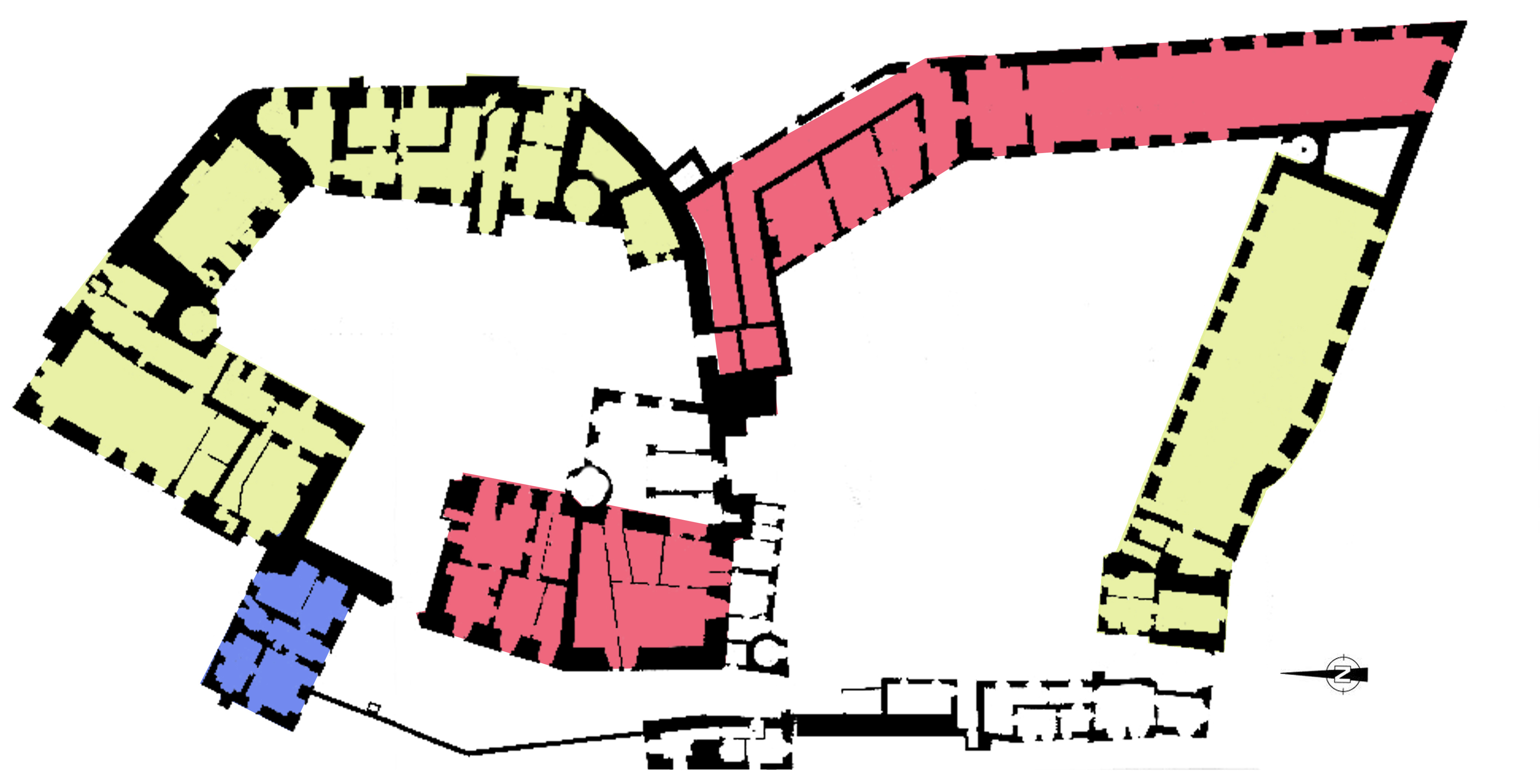 Auf Grundlage Cornelius Gurlitts Übersichtsplan überarbeitete dargestellt farbig Bauepochen (gelb: Anfang 16. Jh ältester Teil mit Vorgängerburg, rot: 19. Jh, blau: um 16. Jh)